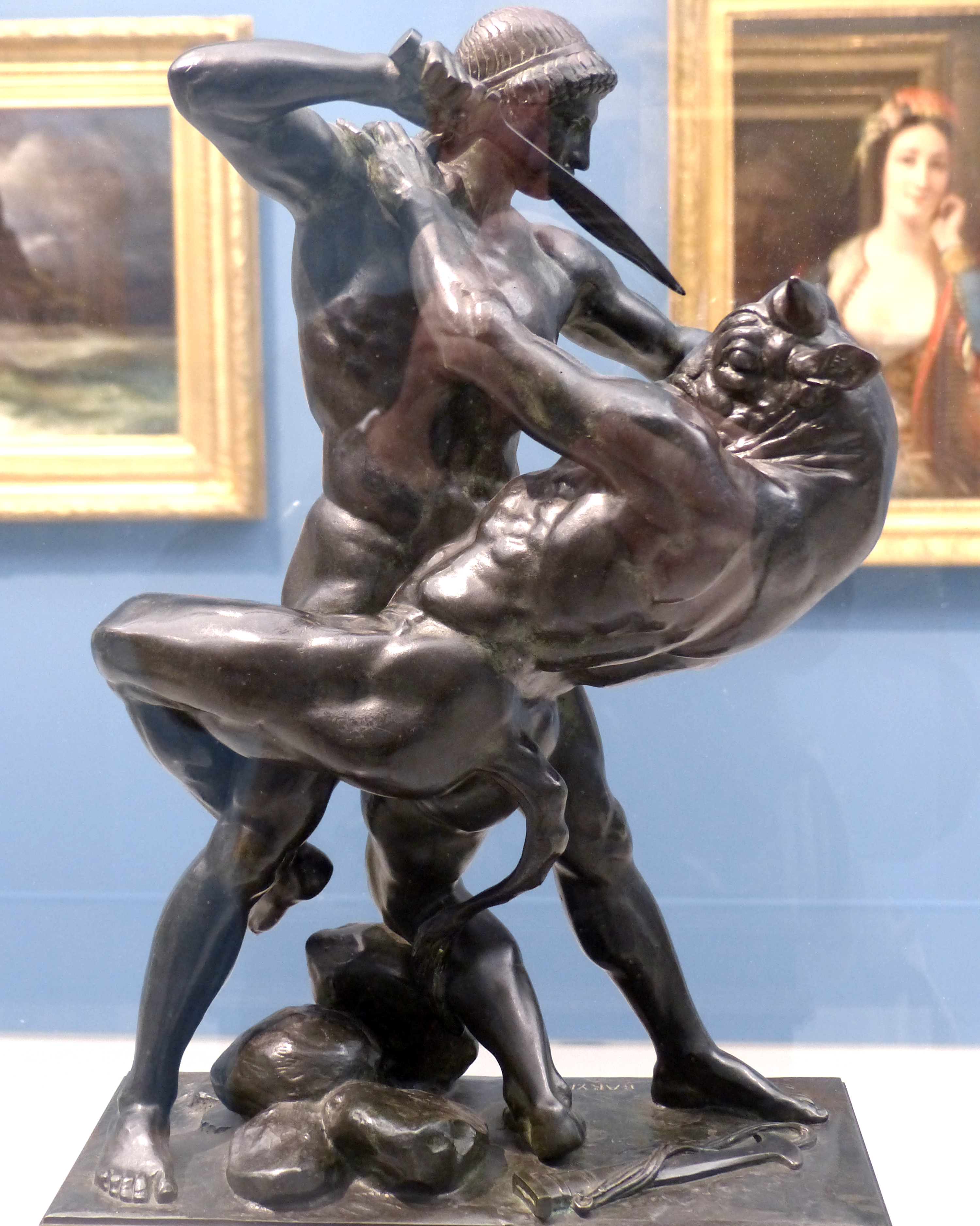 La première édition de ce bronze est de 1857.